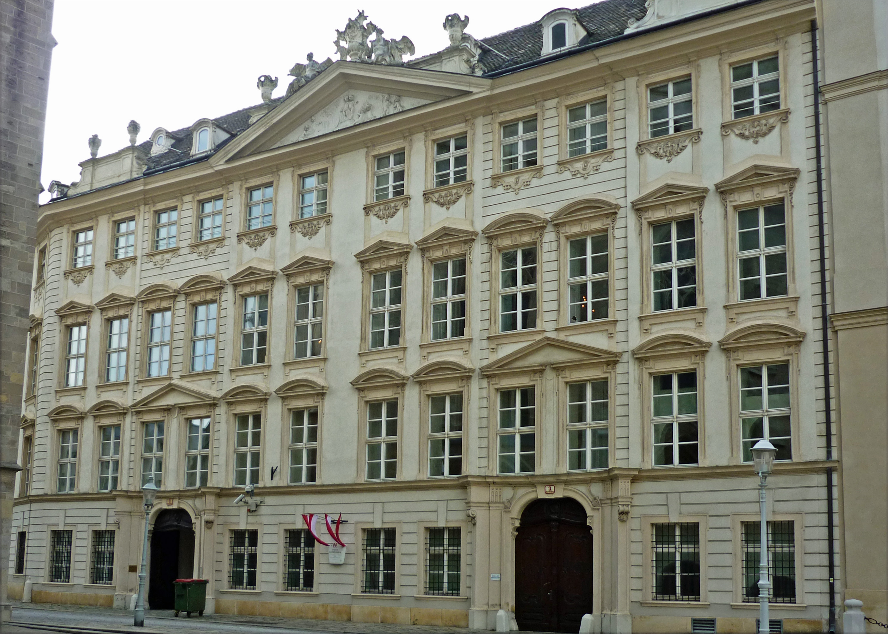 Palais Dietrichstein-Ulfeld in Wien, Minoritenplatz